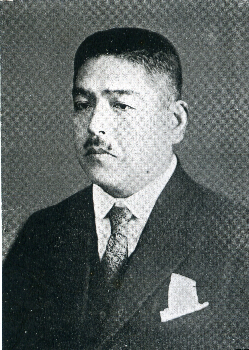 この写真は、上田孝吉（1886-1952）の写真です。